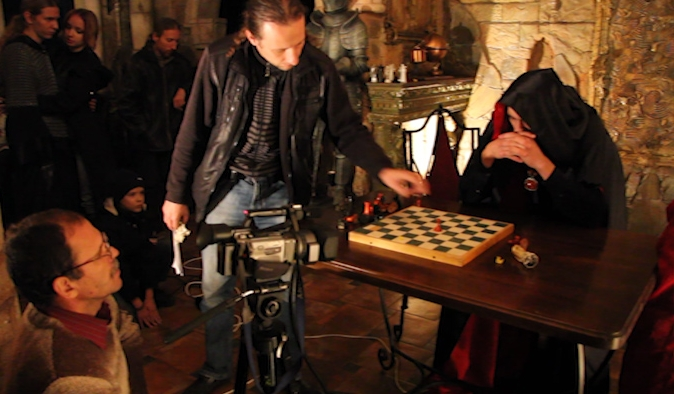 Леонид Ковалевский, Евгений Пронин, Юрий Скляр. Фото со съемок фильма-мюзикла (Дорога без возврата).